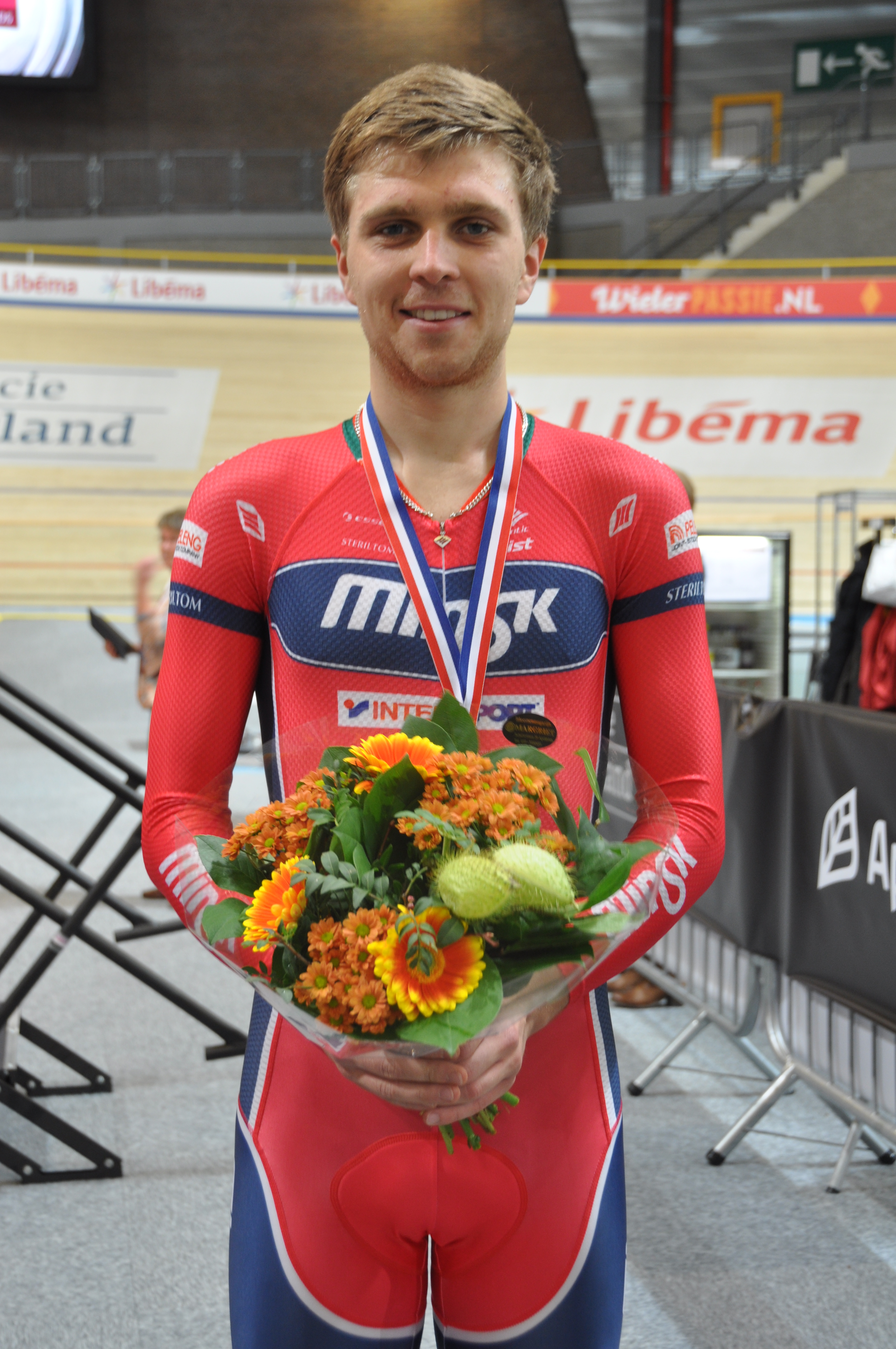 Raman Ramanau, weißrussischer Radsportler, Gold im Scratch